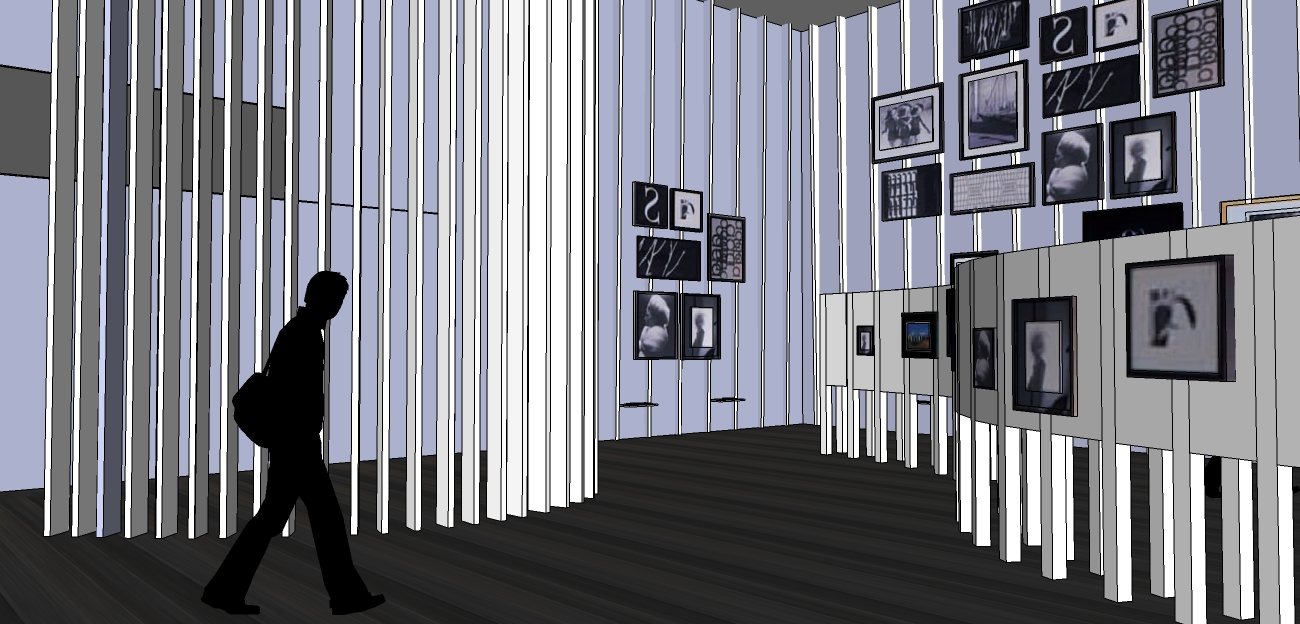 Template:Screenshotcopyrighted